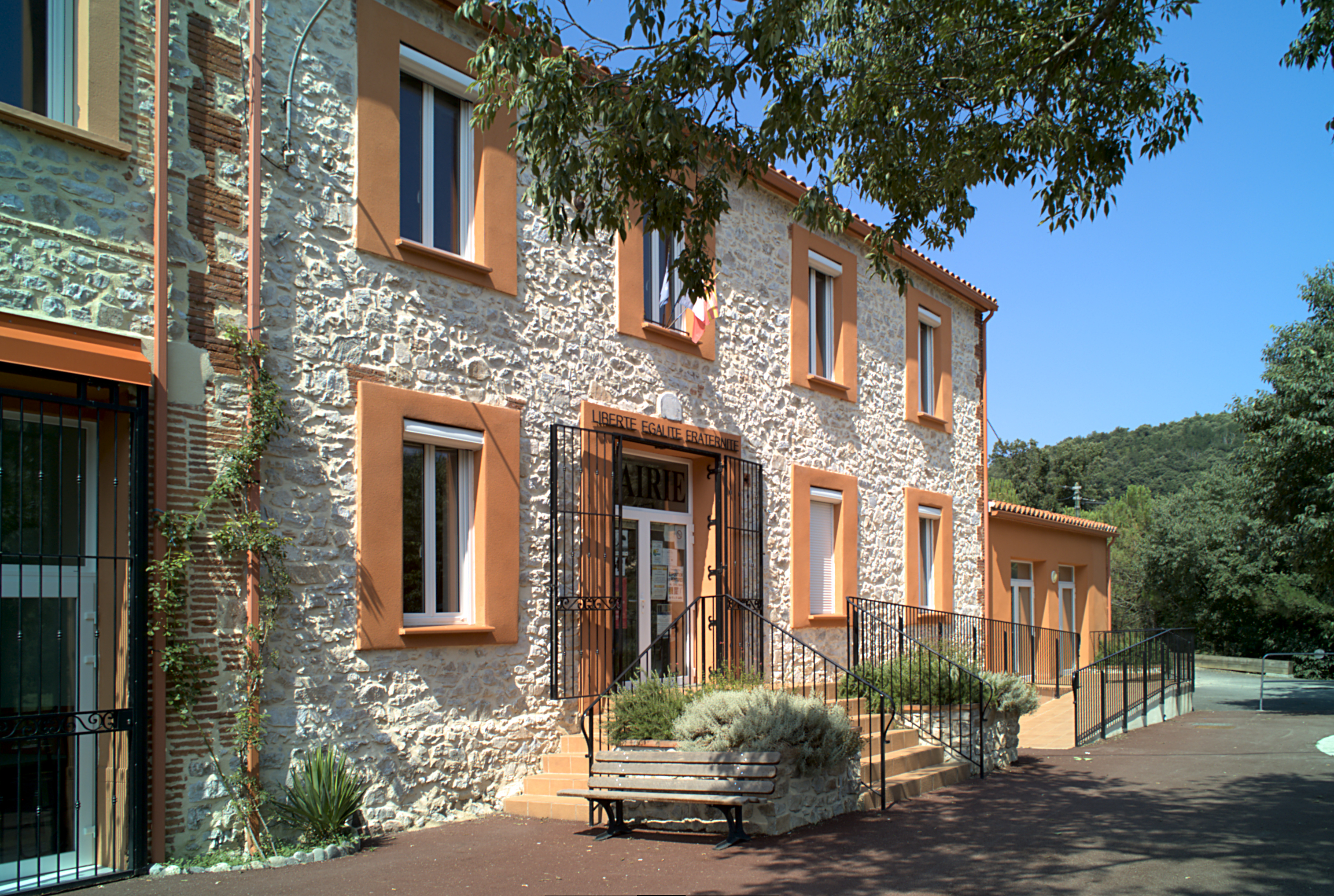 Mairie, Reynès (Pyrénées-Orientales, Languedoc-Roussillon, France)